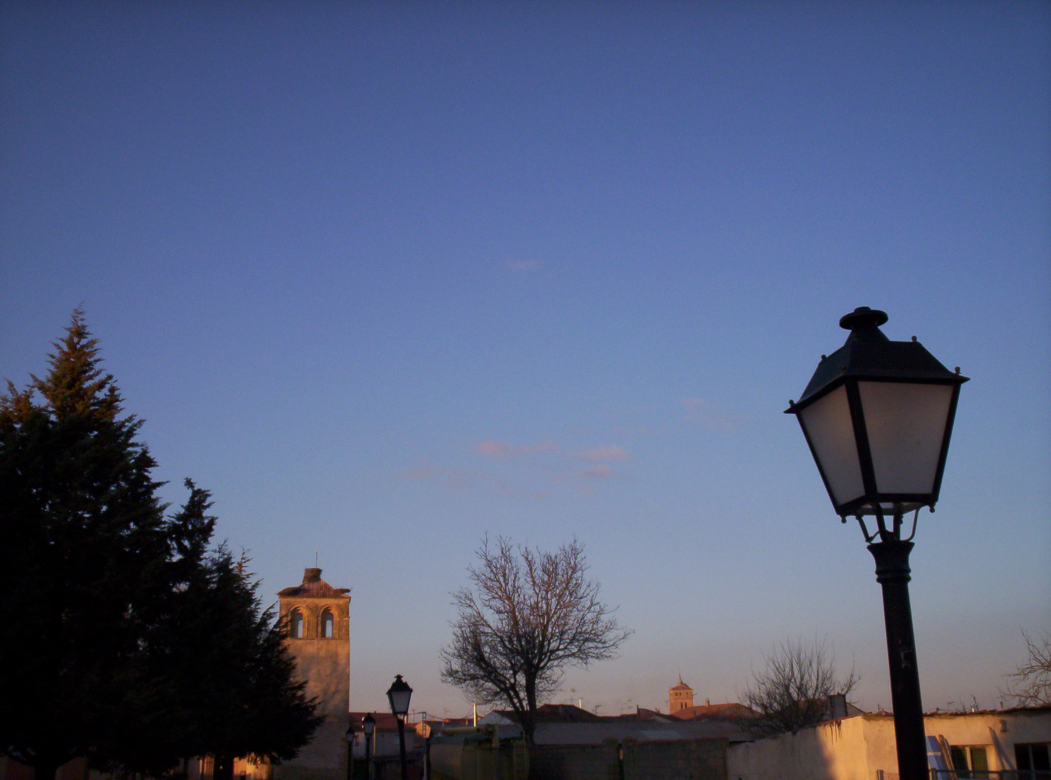 Vista de Aguilafuente (Segovia) desde el suroeste. A la izquierda torre de San Juan, al fondo torre de Santa María